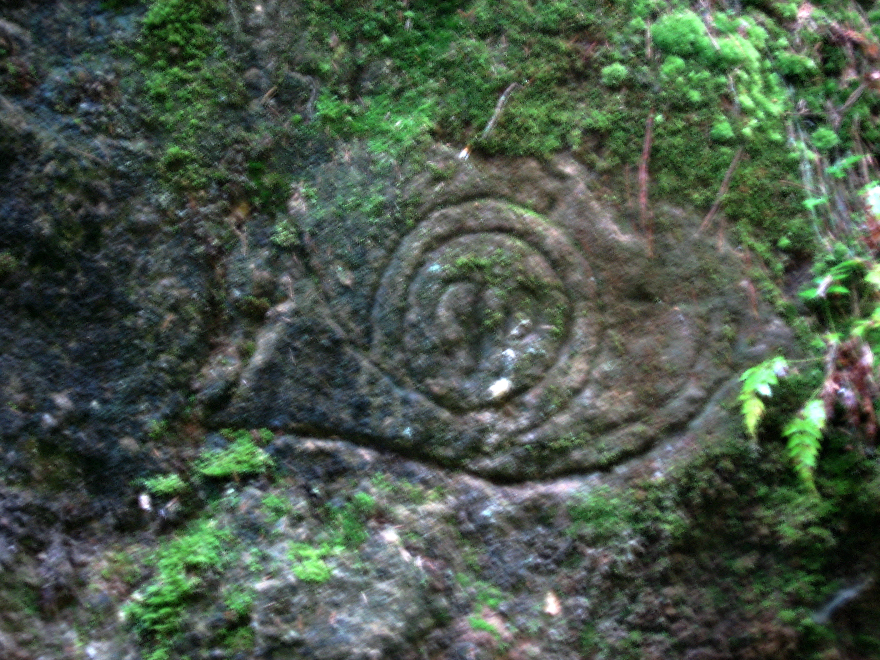 Dürrkamnitz_Relief_Posthorn